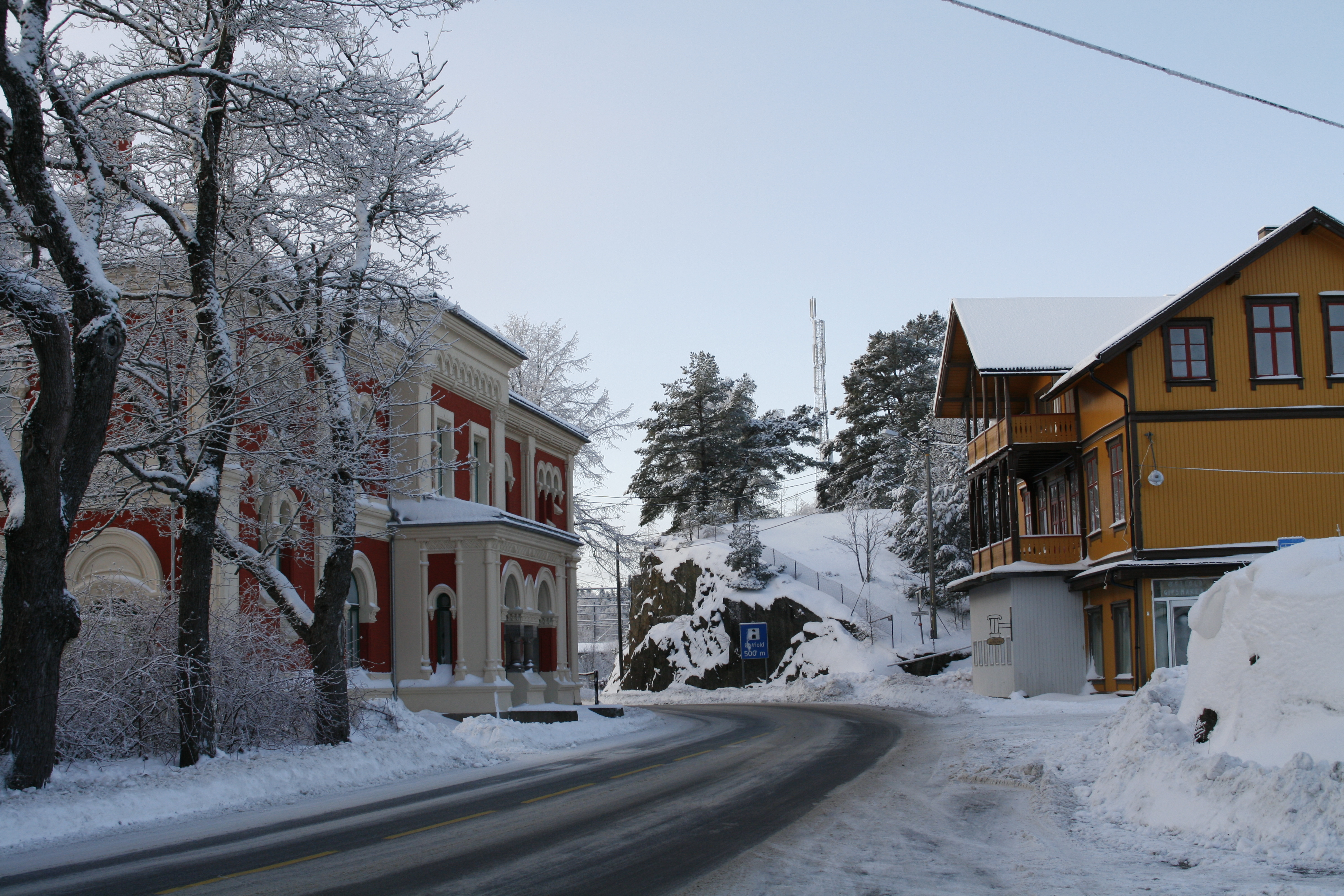 Kornsjø 29. desember 2009